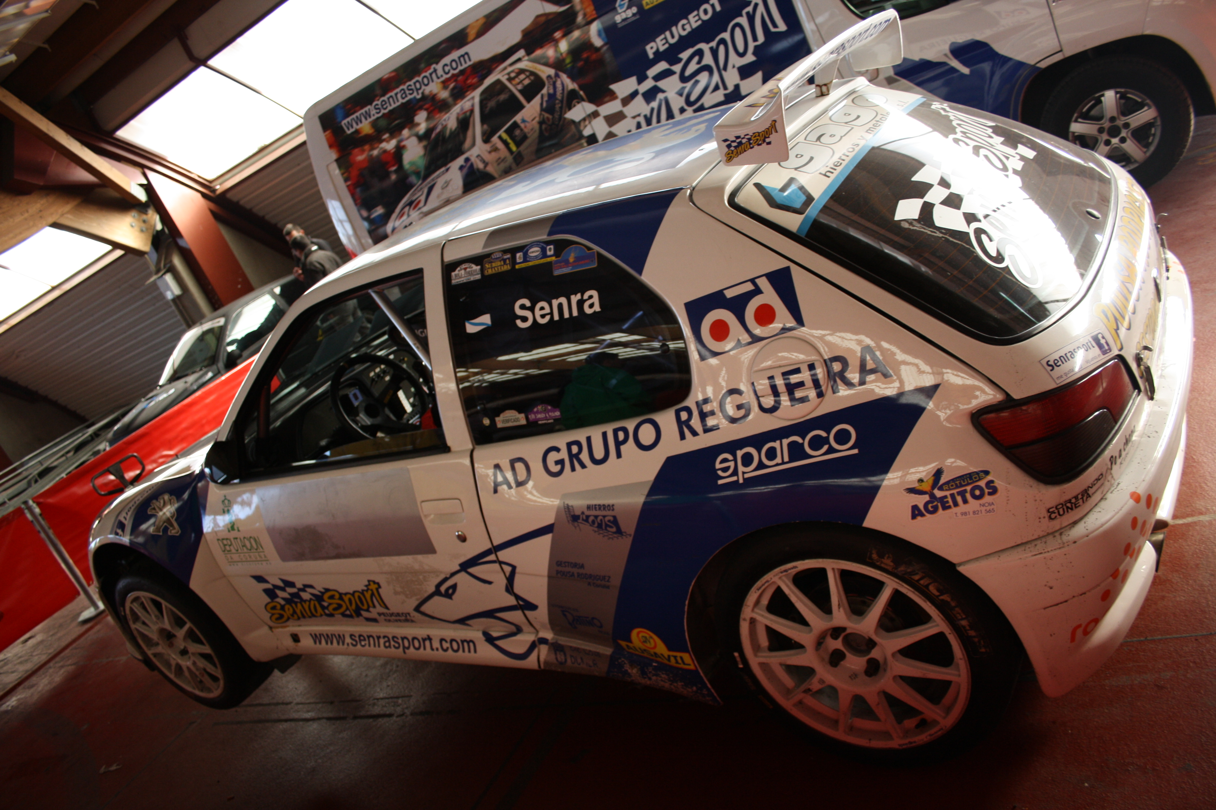 2º Master de Campeones de Galicia. Diciembre de 2012, en Santiago de Compostela.